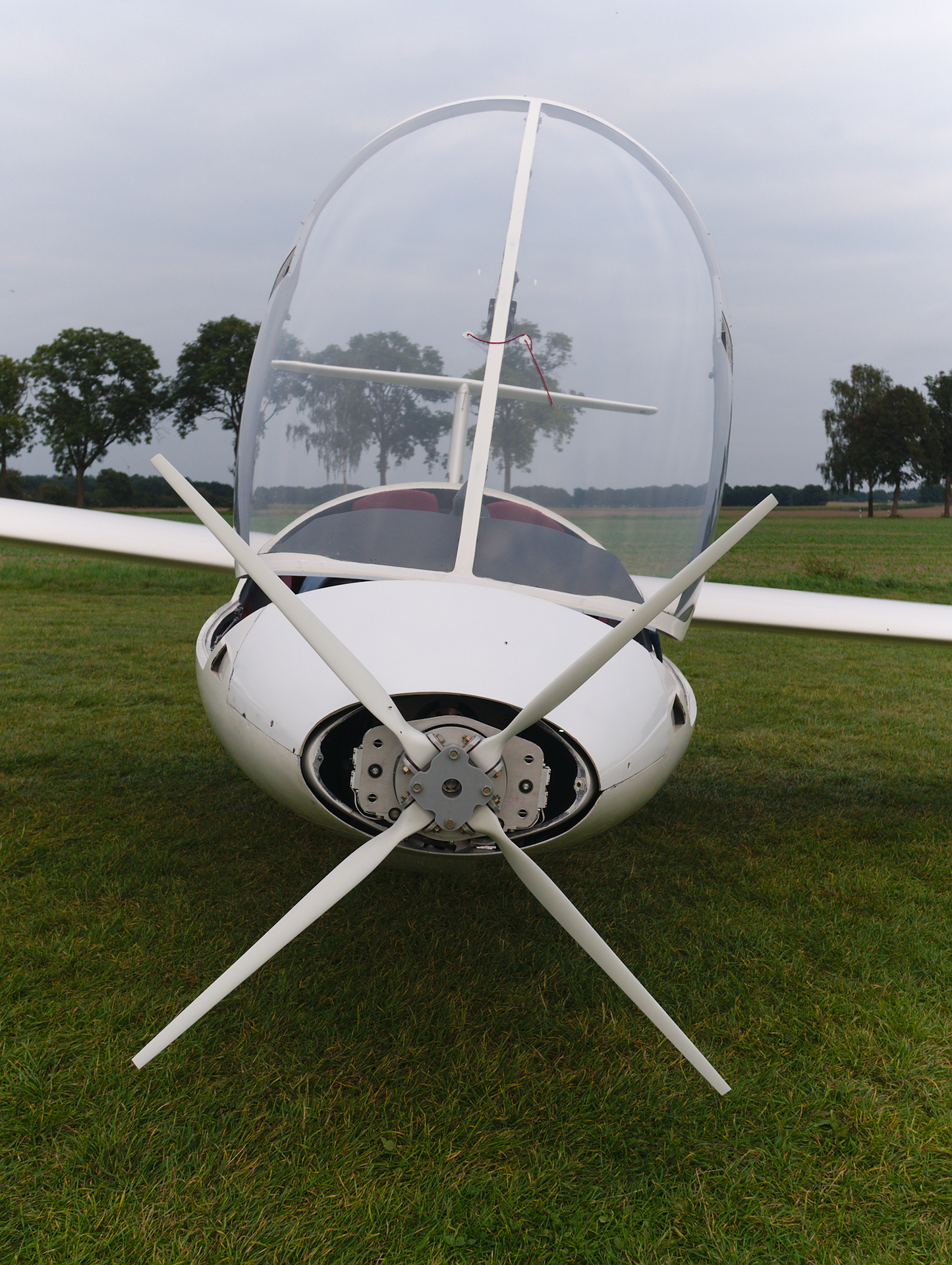 Elektromotorsegler Akaflieg Berlin B13